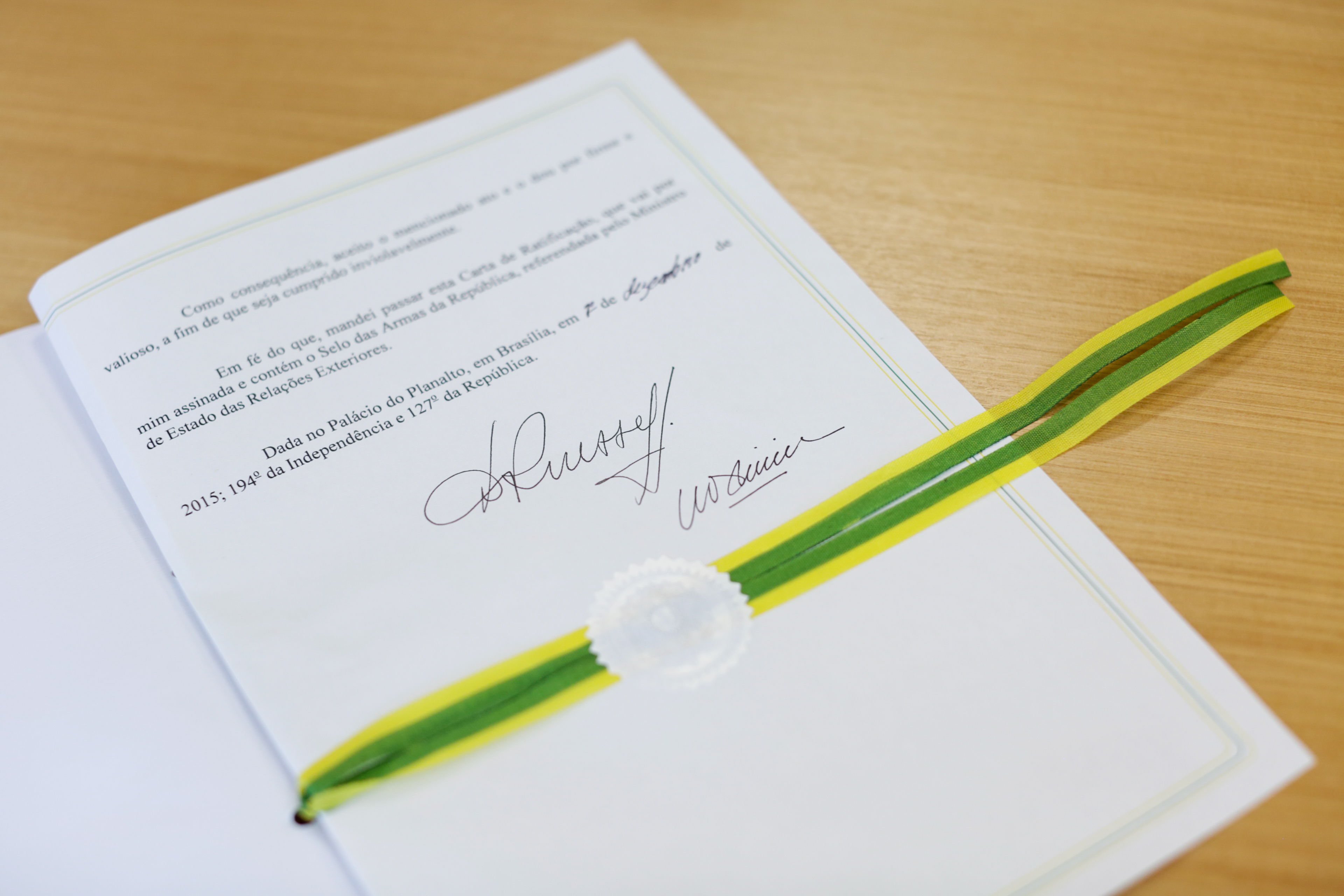 Com a assinatura da presidenta da República, Dilma Rousseff, o Brasil ratificou, nessa terça-feira (1), o Tratado de Marraqueche, que visa facilitar o acesso de pessoas com deficiência visual a obras literárias. A adesão ao tratado havia sido aprovada pelo Senado Federal no último dia 24 de novembro, em dois turnos, após passar pela Câmara dos Deputados. Para finalizar o processo de adesão do Brasil, o diretor de Direitos Intelectuais do Ministério da Cultura, Marcos Souza, irá depositar a carta de ratificação na sede da Organização Mundial da Propriedade Intelectual (OMPI), na Suíça, na próxima semana, quando participa da 31ª Sessão do Comitê Permanente de Direito do Autor e Direitos Conexos da organização internacional. As nações que aderirem ao acordo se comprometem a criar dispositivos na legislação nacional para que obras, tais como livros e outros materiais em formato de texto e ilustrações correlatas, possam ser reproduzidas e distribuídas em formatos acessíveis, como o Braille, Daisy ou mesmo em audiolivro, sem a necessidade de autorização do titular de direitos autorais. O tratado entrará em vigor depois de ratificado em 20 países. Atualmente, outros 11 já estão nessa condição: Argentina, Coreia do Sul, El Salvador, Emirados Árabes Unidos, Índia, Mali, México, Mongólia, Paraguai, Cingapura e Uruguai. Foto:LiadePaula/MinC 02/12/2015 Brasília-DF